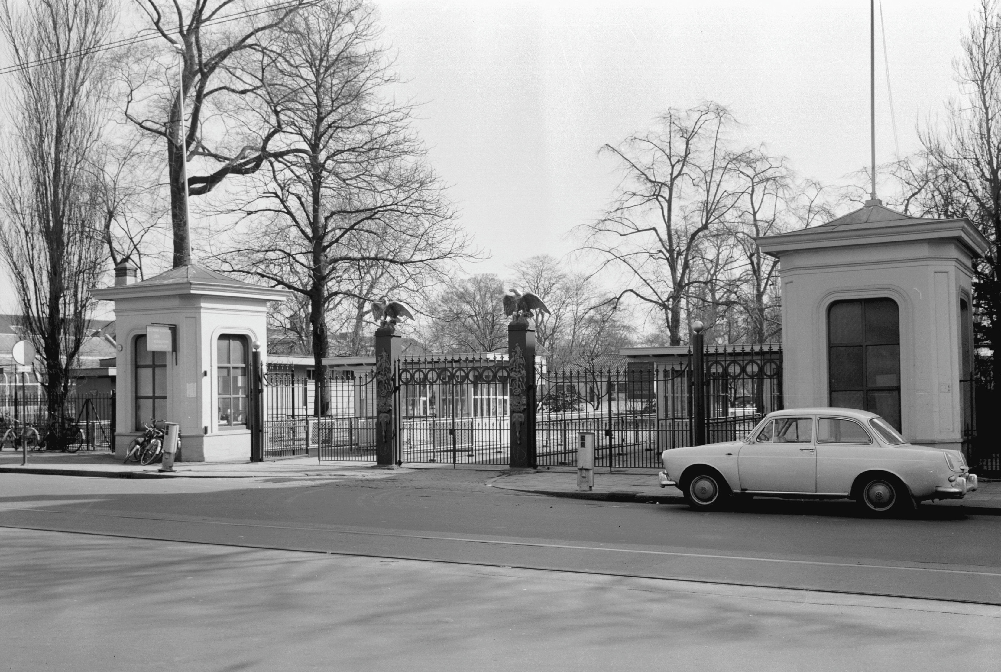 Artis ingangshek